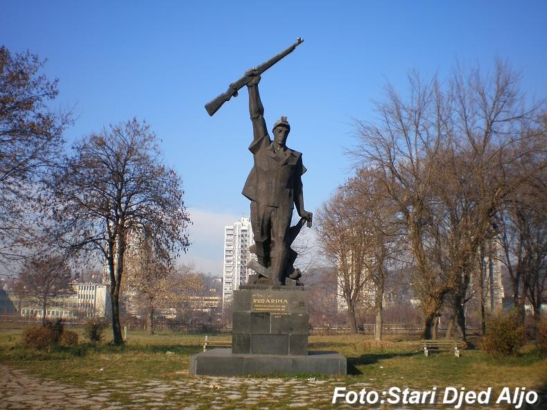 Husinski rudar Tuzla(Stari Djed Aljo)